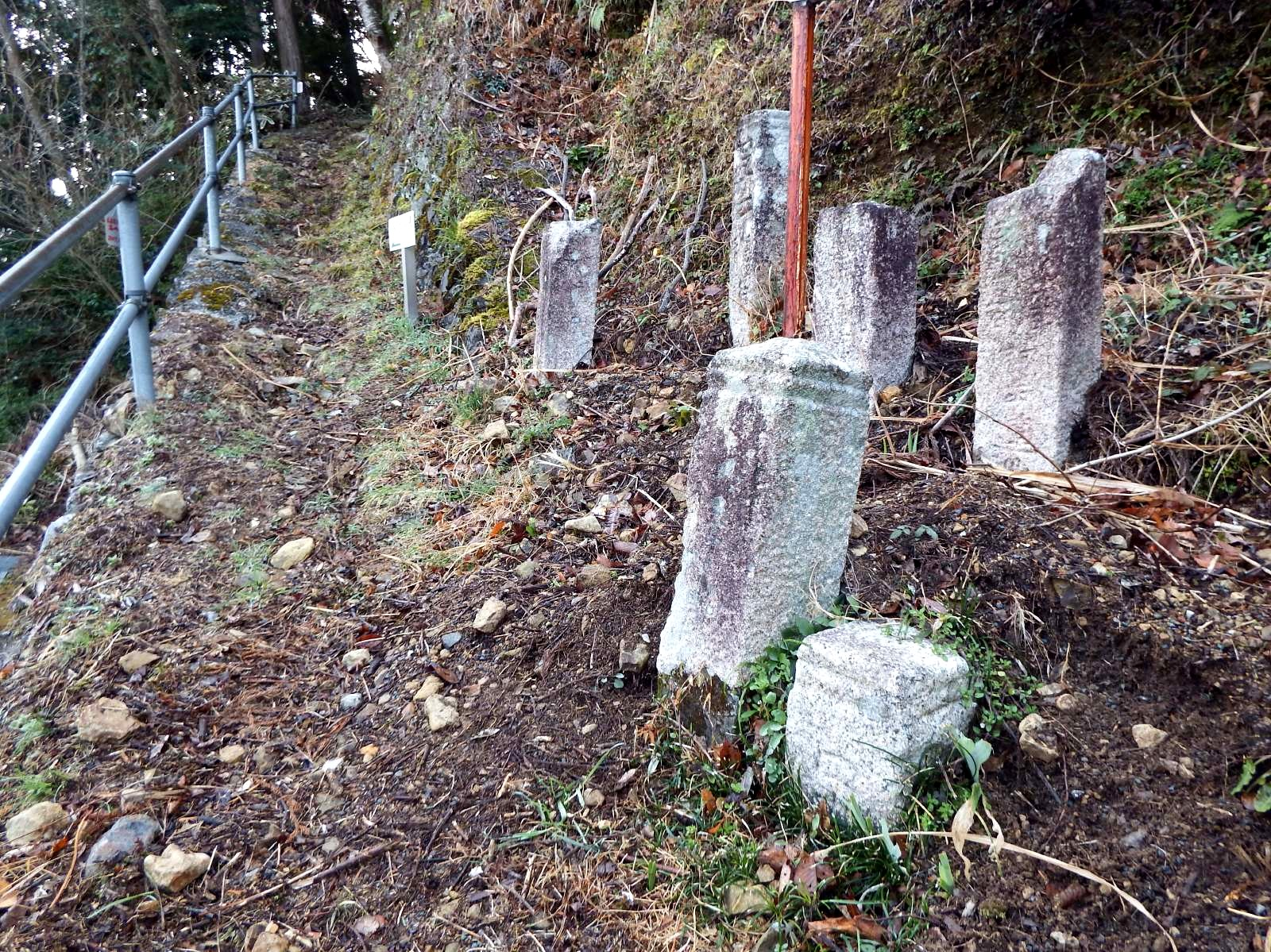 一宿寺にある太龍寺の丁石とかも道の登口